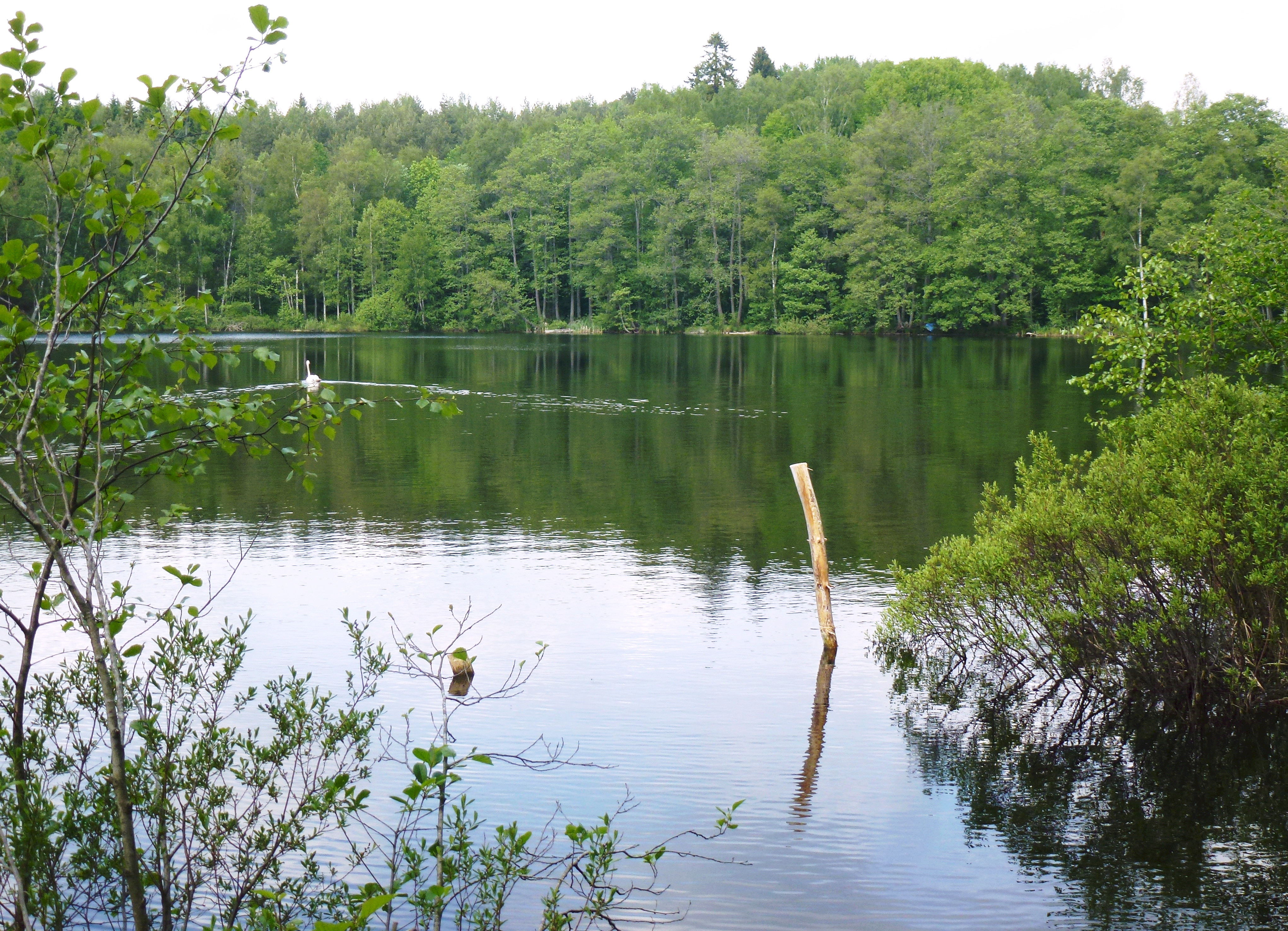 Sjön Getryggen